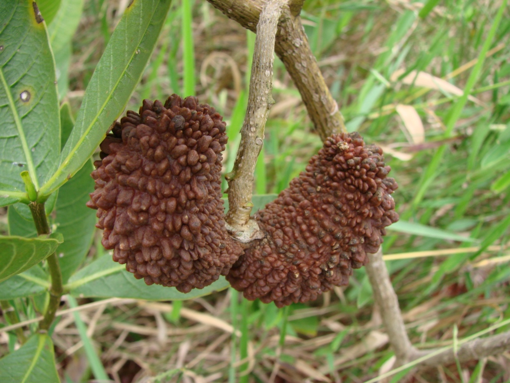 Tabernaemontana hystrix - APOCYNACEAE - Campus da Universidade de Brasília - UnB - Distrito Federal - Brasil.